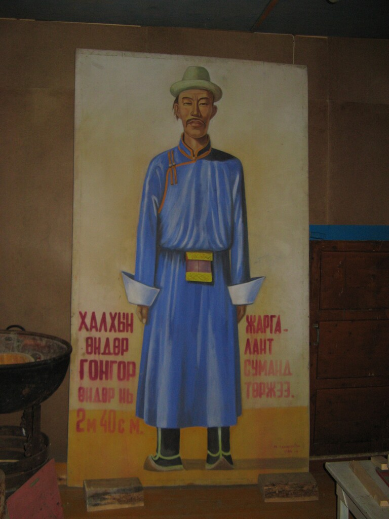 Öndör Gongor paint at Jargalant Museum (Khövsgöl Province)